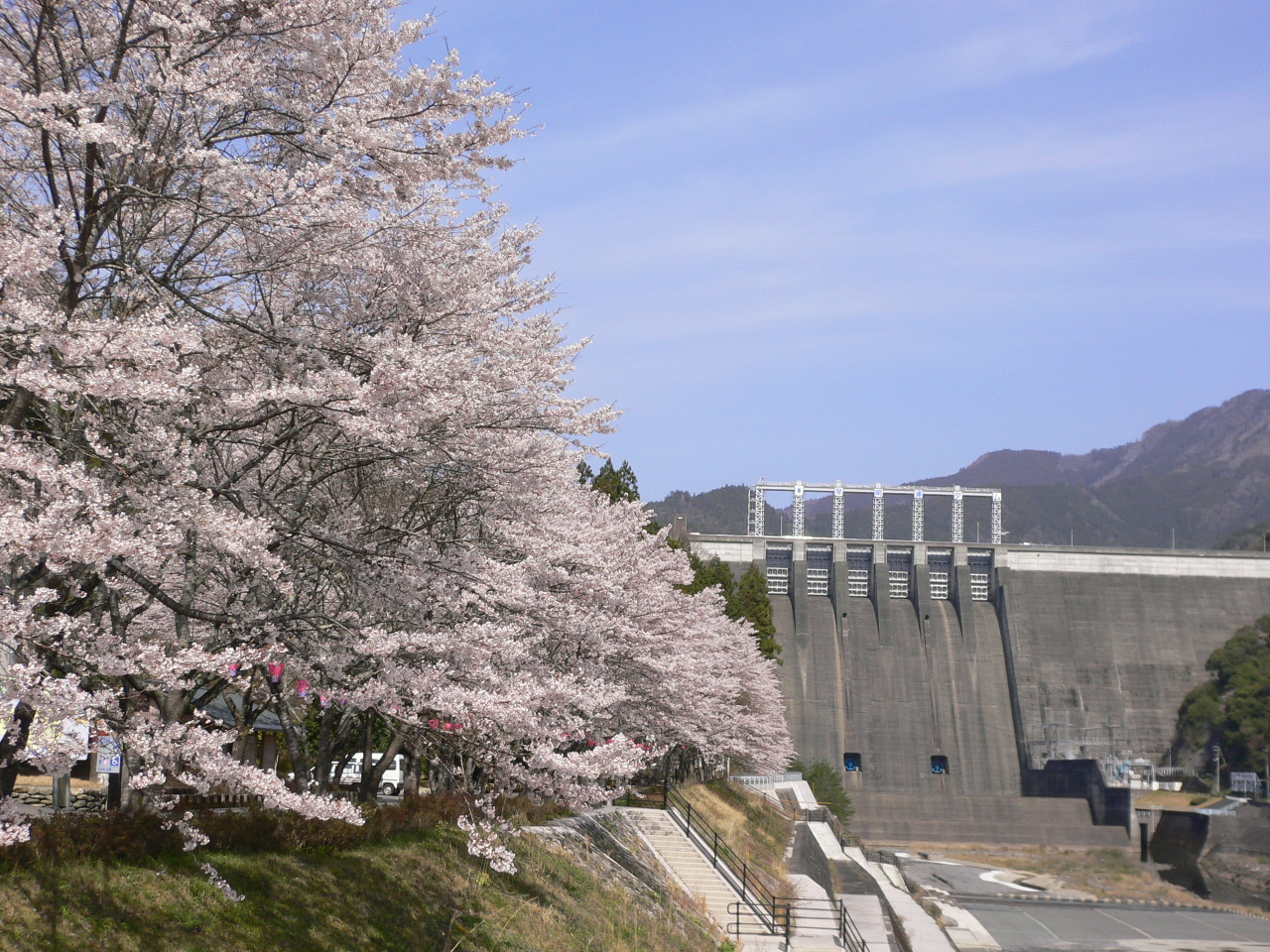 高知県土佐町 早明浦ダム堰堤直下より本人撮影（2006年4月6日）